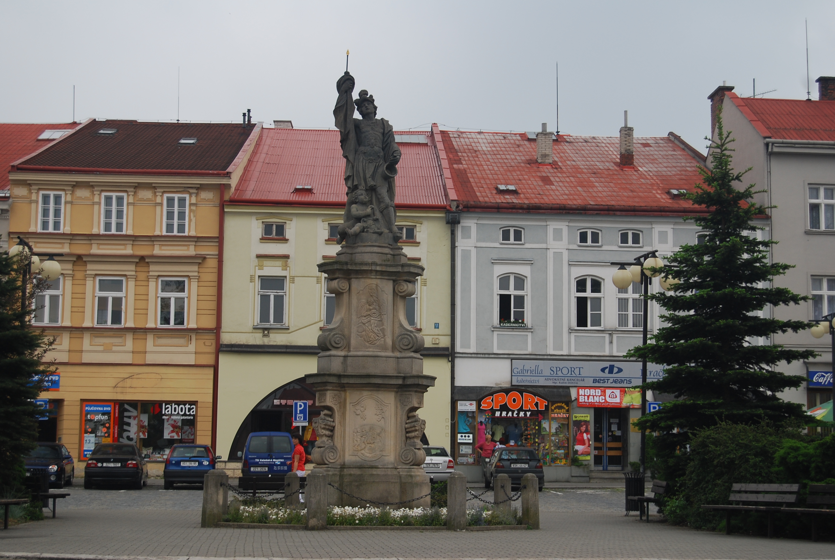 Svatý Florián na Náměstí ve Valašském Meziříčí